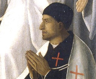 Detalle de La Virgen del Caballero de Montesa (Museo del Prado). El caballero representado ha sido identificado como Luis Despuig.